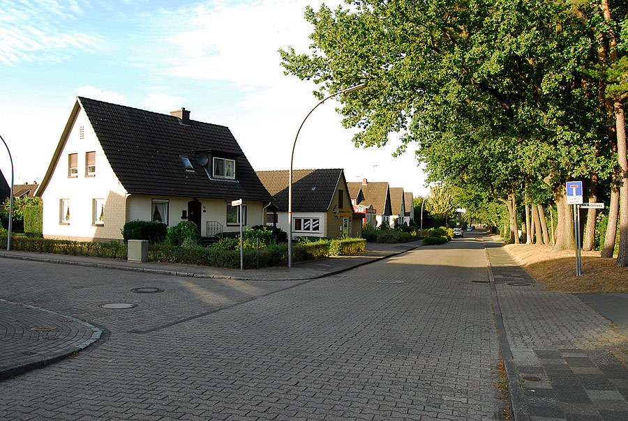 Zeven Aspe Wohnbebauung